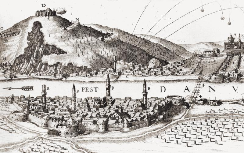 Pest városa 1684-ben, rézmetszet